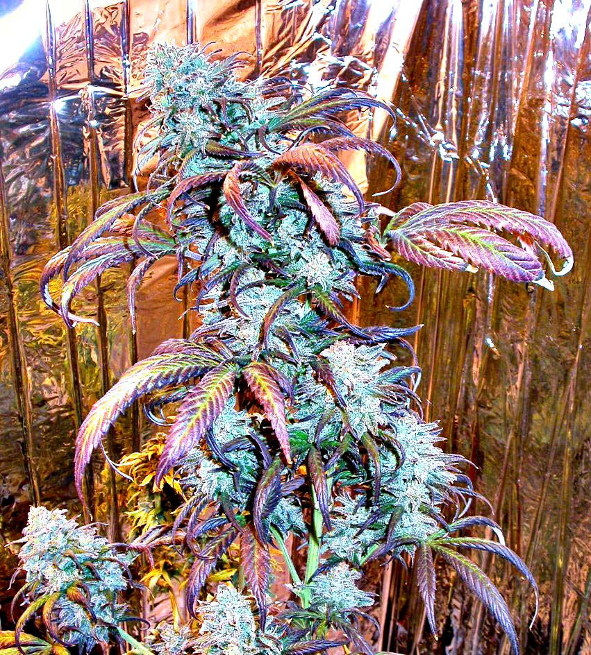 Cannabis sativa (plant femelle), variétée M-39. La durée de la maturation dure environ 39 jours comme l'indique son nom. Cette variété a longtemps été une des favorites des Québécois. Cultivée en intérieur autant qu'à l'extérieur cette plante donne raison à tous les acheteurs de s'en procurer.